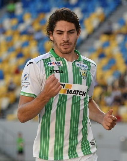 Густаво Бланко Лещук - гравець Карпат